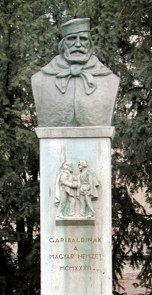 Statua di Giuseppe Garibaldi a Budapest-Ungheria